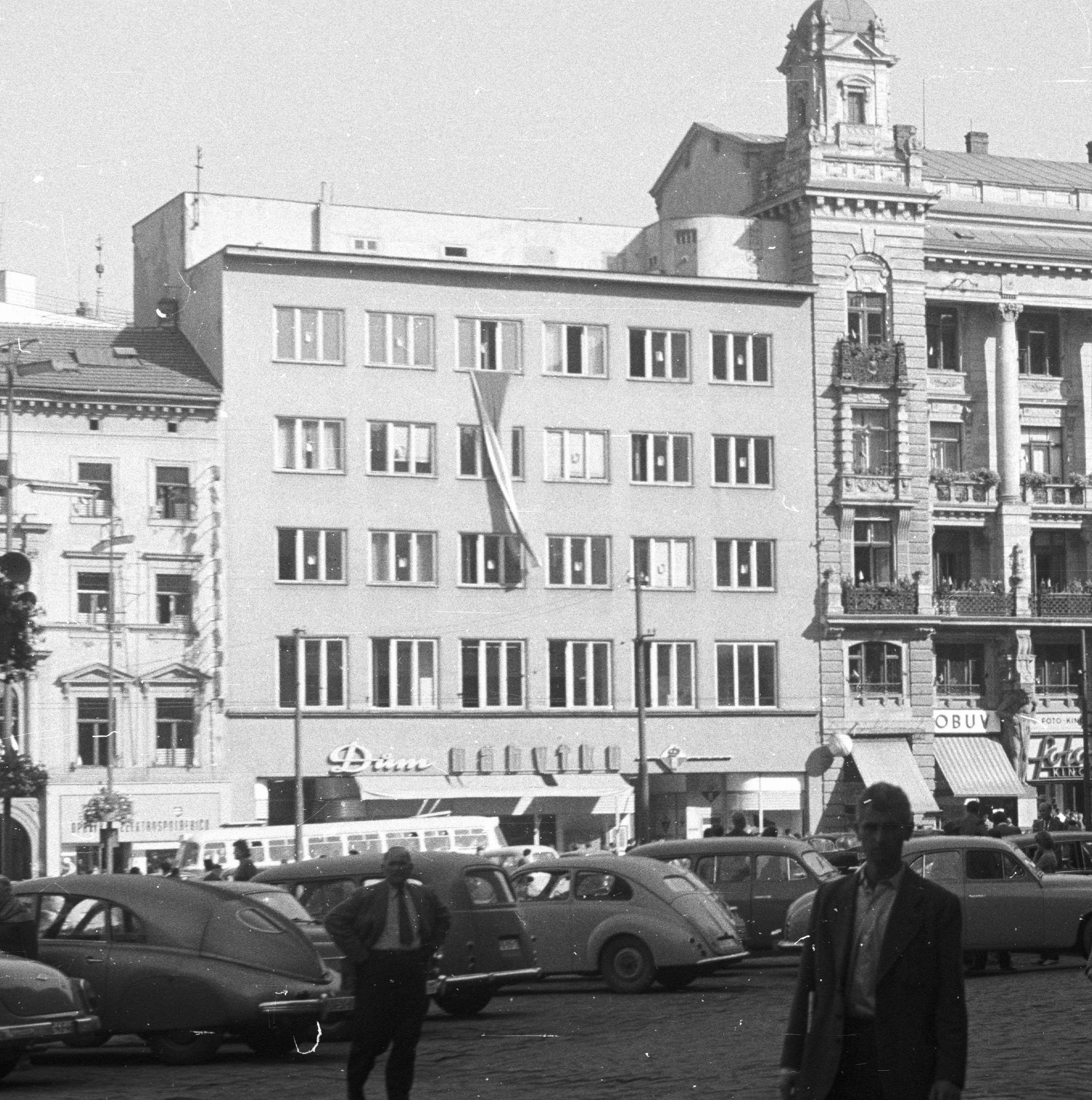 namesti Svobody. Location: Czech Republik, Brno Tags: Czechoslovakia, street view, genre painting, automobile, lamp post, flag, Tatra-brand, Czechoslovak brand Title: namesti Svobody.